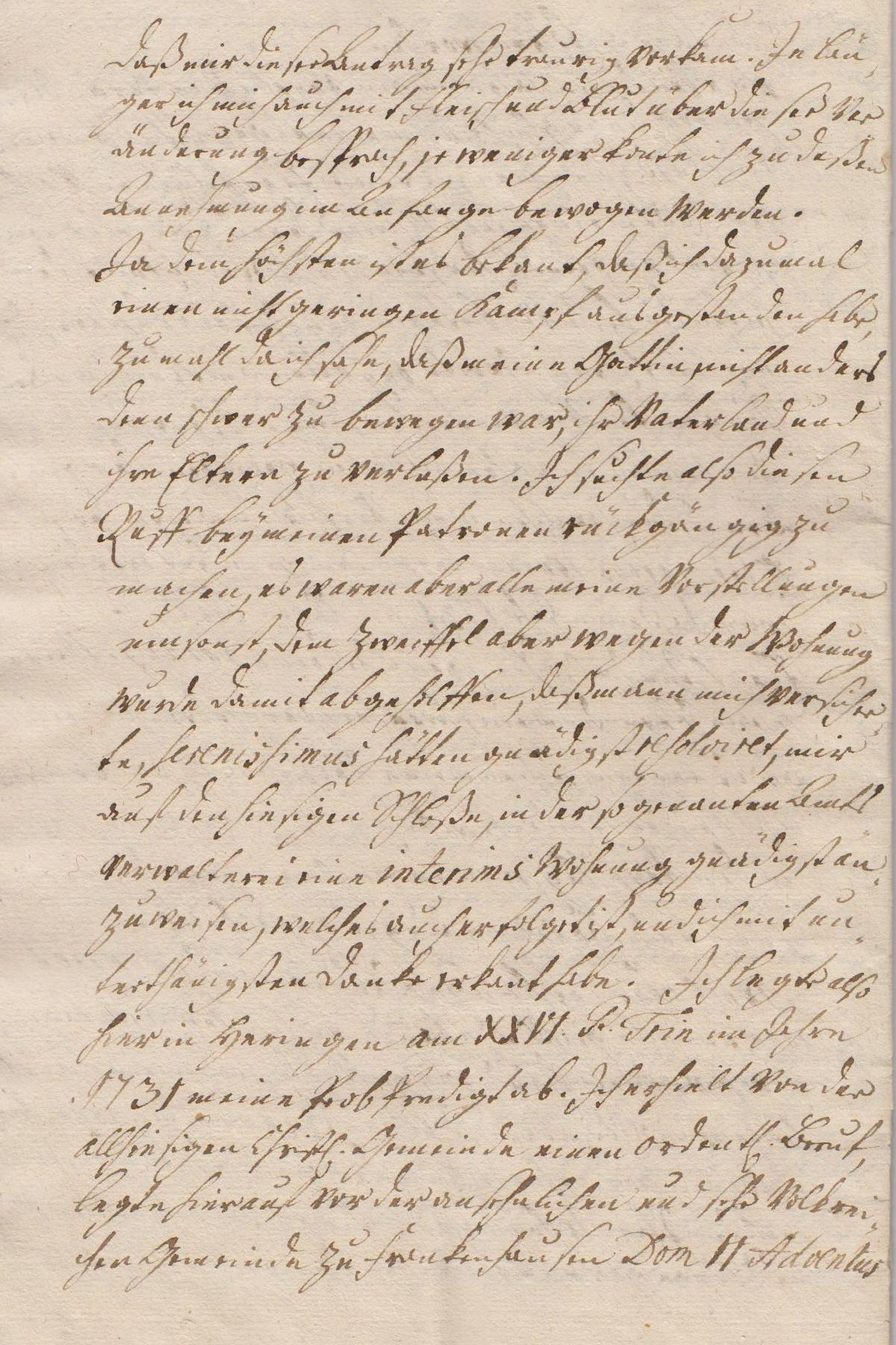 Seite 10 der Leichenpredigt für den Pastor August Wilhelm Reinhart (1696/1770), Bürger der Stadt Heringen an der Helme.